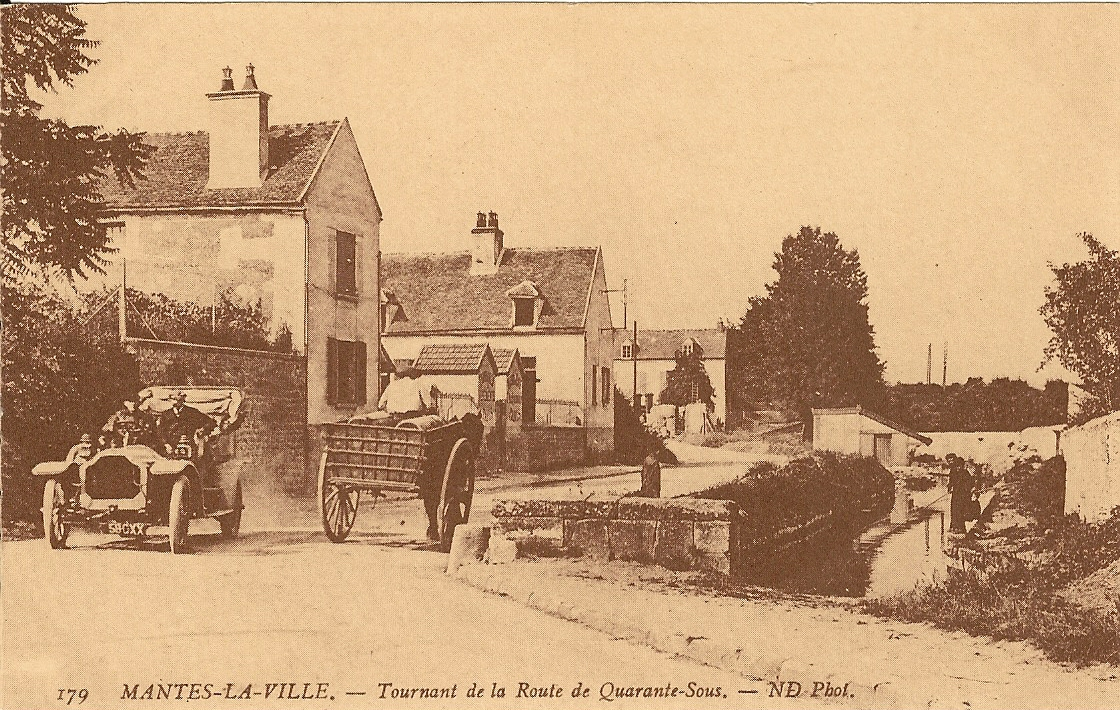 Vue de la route de Quarante Sous à Mantes-la-Ville (Yvelines , France) au début du XXe siècle